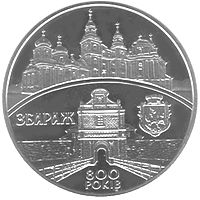 Монета «800 років м. Збараж» (реверс)